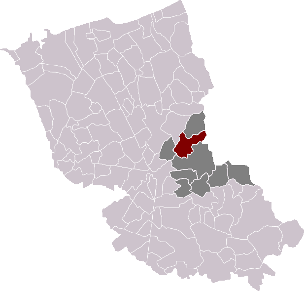 Locatie gemeente Winnezele in arrondissement Duinkerke. Zelfgemaakt. Location of Winnezeele municipality in the arrondissement of Dunkirk. Self made. Localisation de la commune de Winnezeele dans l'arrondissement de Dunkerque. Fait moi-même.